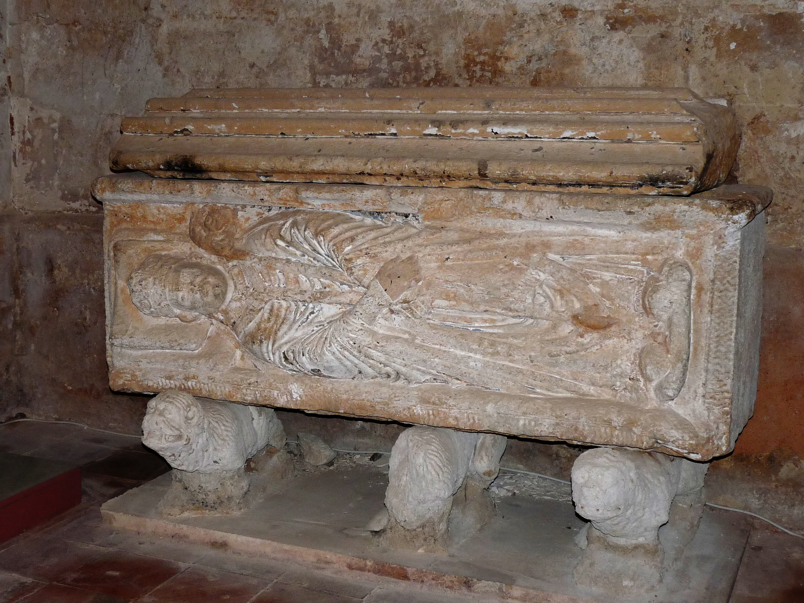 Monaterio de Santa María de Huerta - Interior de la iglesia - Cenotafio de Rodrigo de Jiménez de Rada (actualmente vacío)